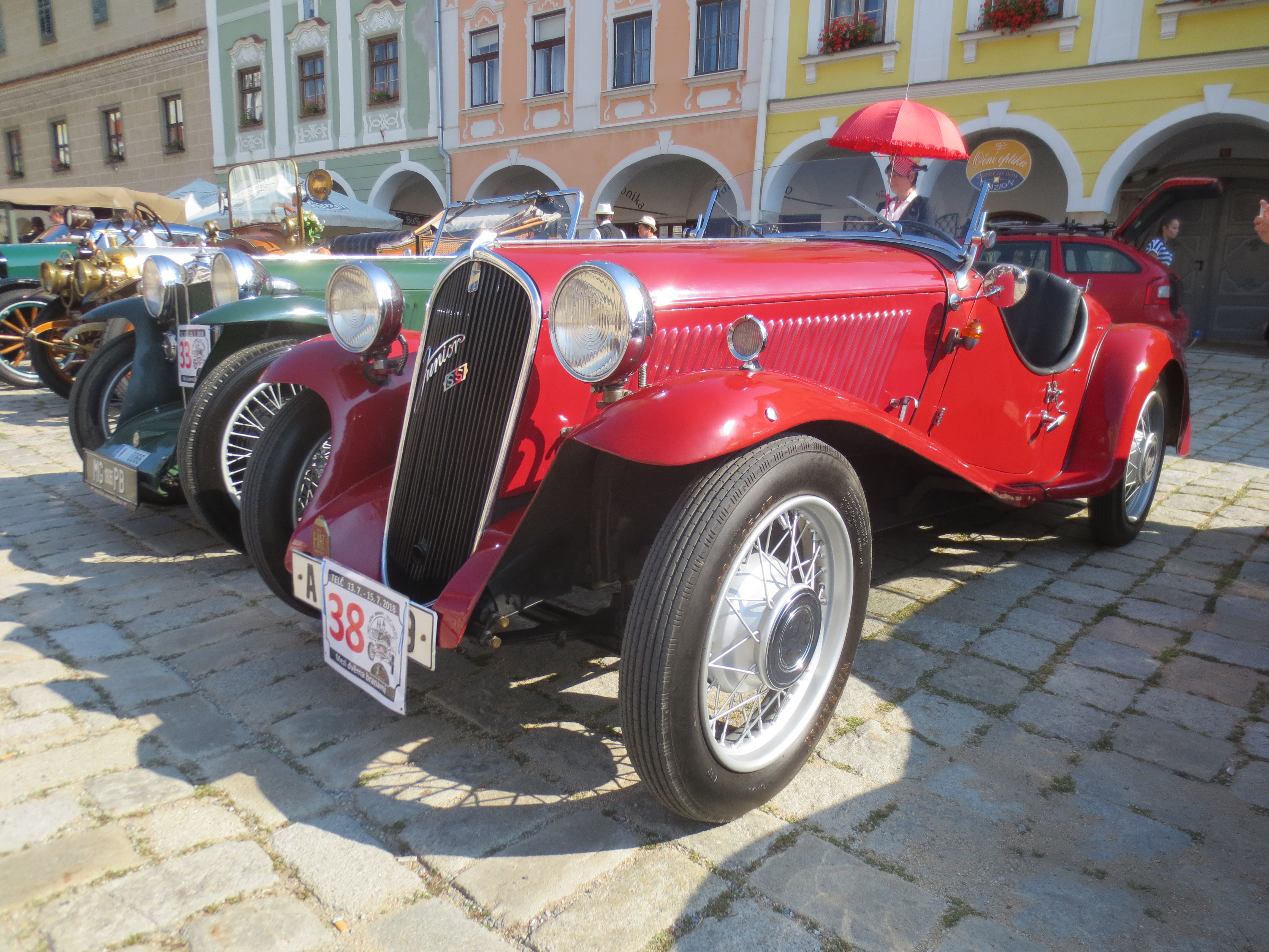 Walter Junior SS (1935)